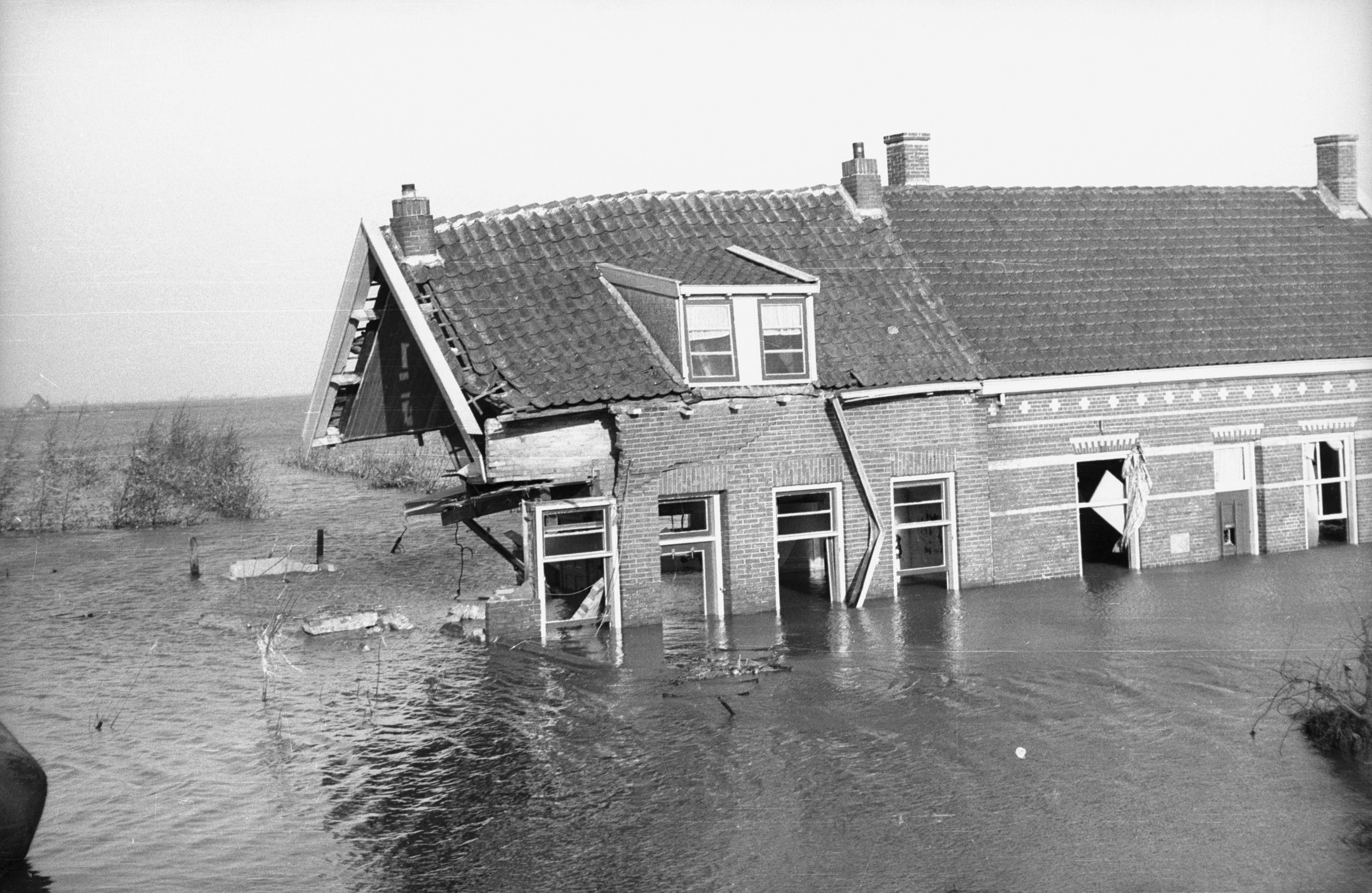 Nationaal Archief Beschrijving: Geruïneerde huizen tijdens de Watersnoodramp van 1953. Gefotografeerd tijdens bezoek van Koningin Juliana aan het overstroomde gebied. Datum: februari 1953 Bestanddeelnummer 007-0137-15 URL: [1] Voor meer informatie over het Nationaal Archief: Voor meer foto's uit deze en andere collecties, bezoek onze Beeldbank: [2] U kunt ons helpen onze kennis van de fotocollecties te verrijken door tags en commentaren toe te voegen. Herkent u mensen of locaties of heeft u een bijzonder verhaal te vertellen bij één van de foto's, laat dan een reactie achter (als u ingelogd bent bij Flickr) of stuur een mailtje naar